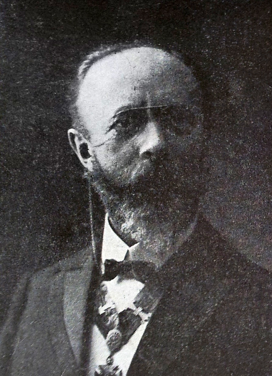 Retrato fotográfico de Heinrich Immenkamp, pintor alemán, publicado en 1924.